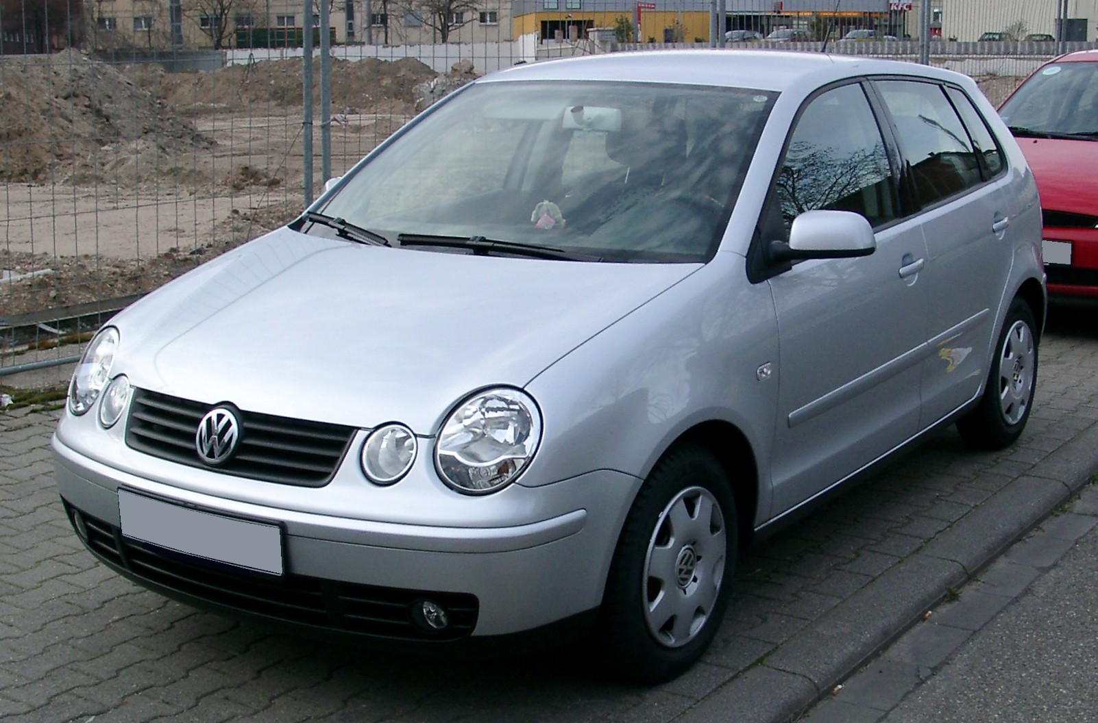 VW Polo IV